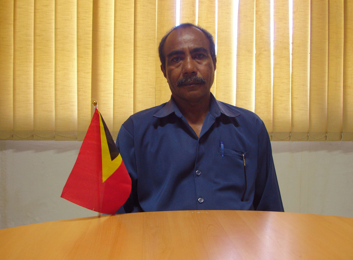 Graciano M. Hornai, Administrator des Subdistrikts Atsabe